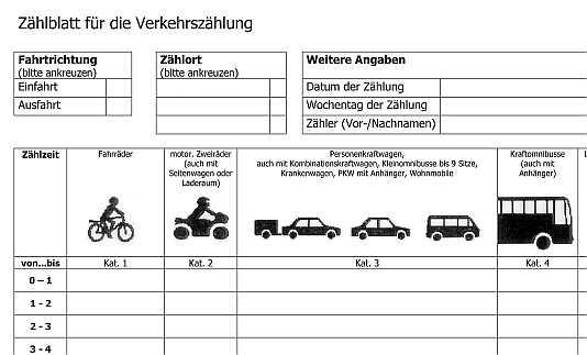 Ausschnitt aus einem Zählblatt für eine Verkehrszählung (Querschnittszählung)